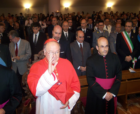 Renato Raffaele Cardinal Martino